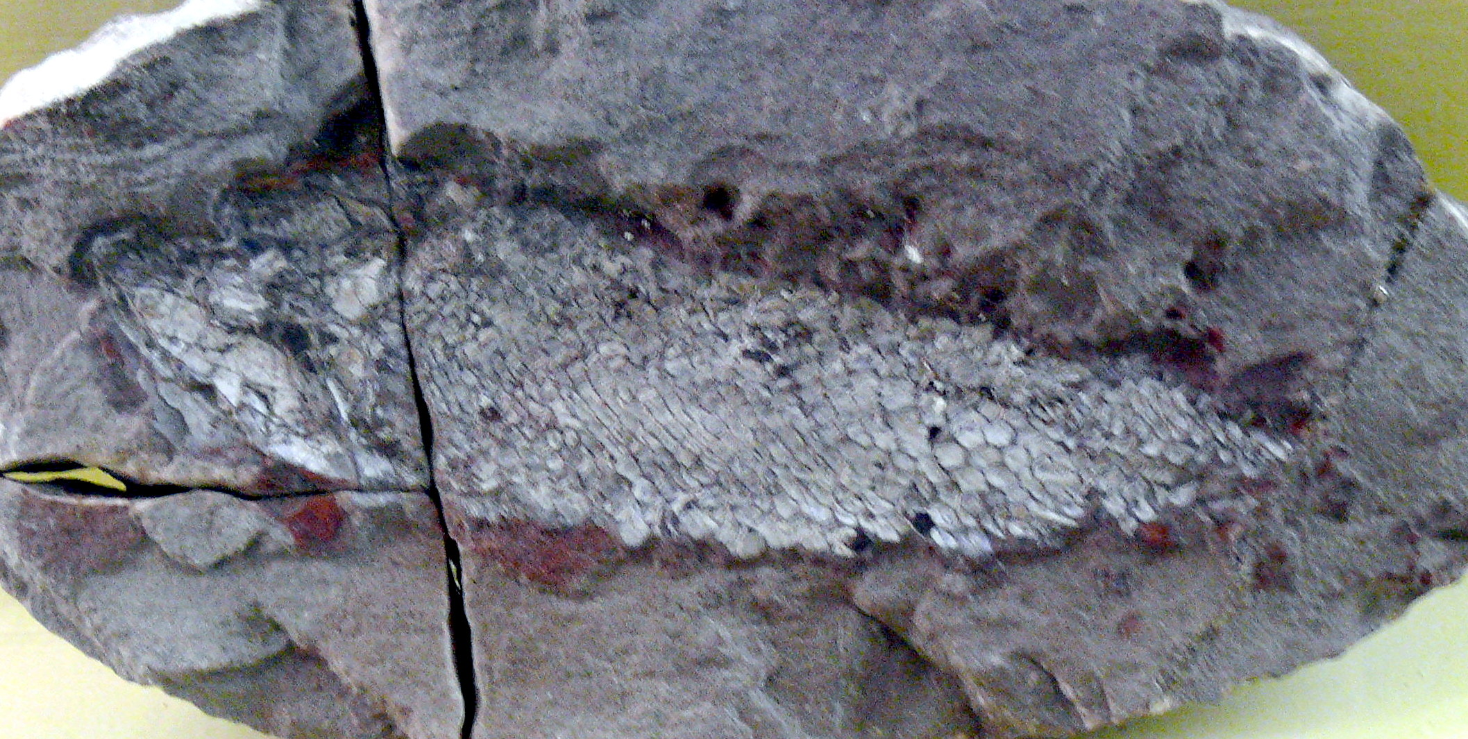 Osteolepis macrolepidotus AGASSIS, Devon, Scotland